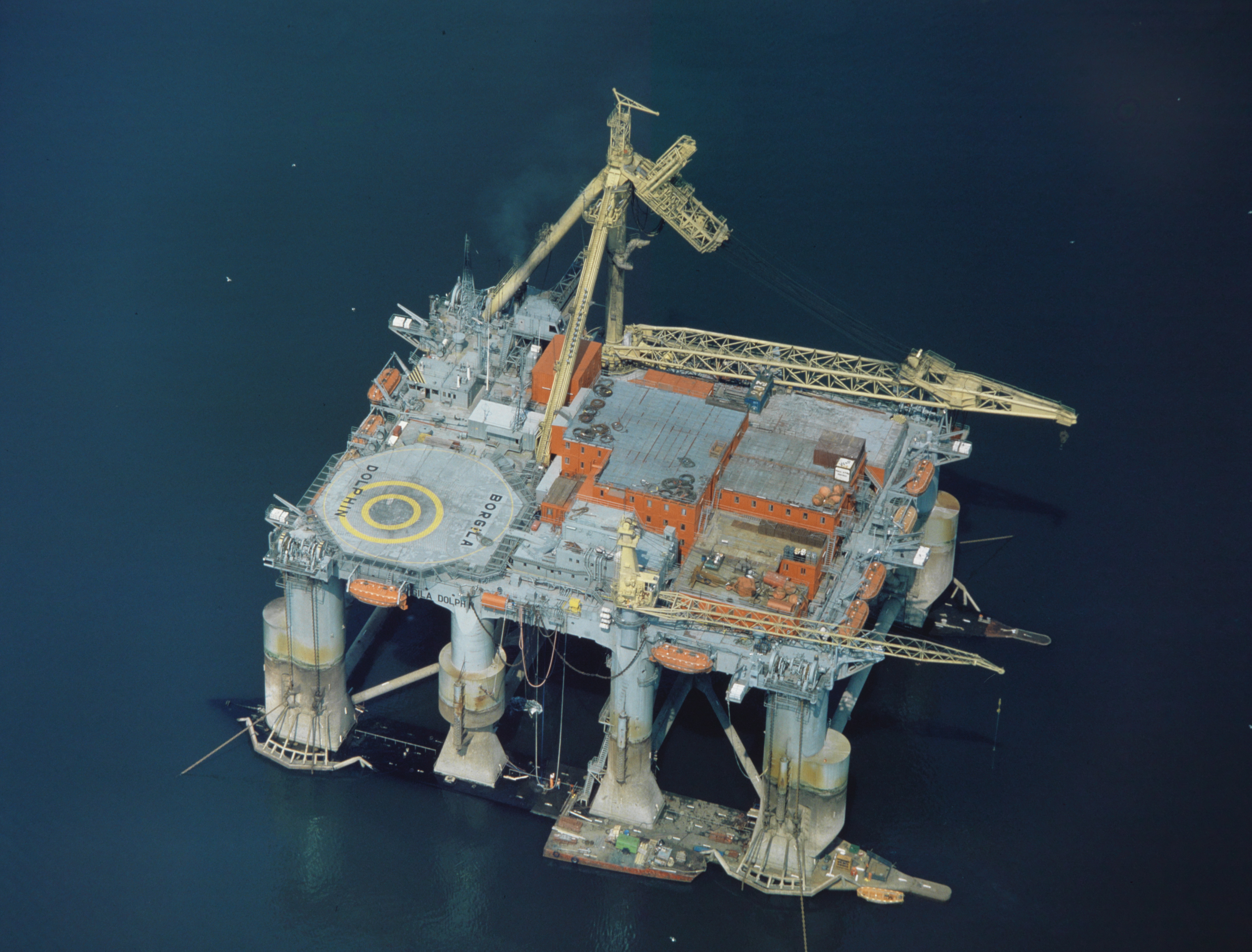 Boreriggen Borgila Dolphin